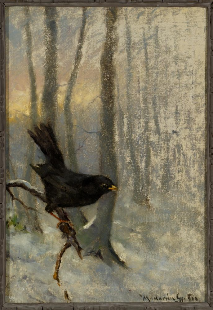 Madarász Gyula: Madár az ágon című festménye